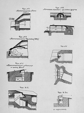 Данное изображение было использовано в статье «Бронеказемат» опубликованной в пятом томе «Военной энциклопедии», который был издан книгоиздательским товариществом Ивана Дмитриевича Сытина в 1911 году в столице Российской империи городе Санкт-Петербурге.